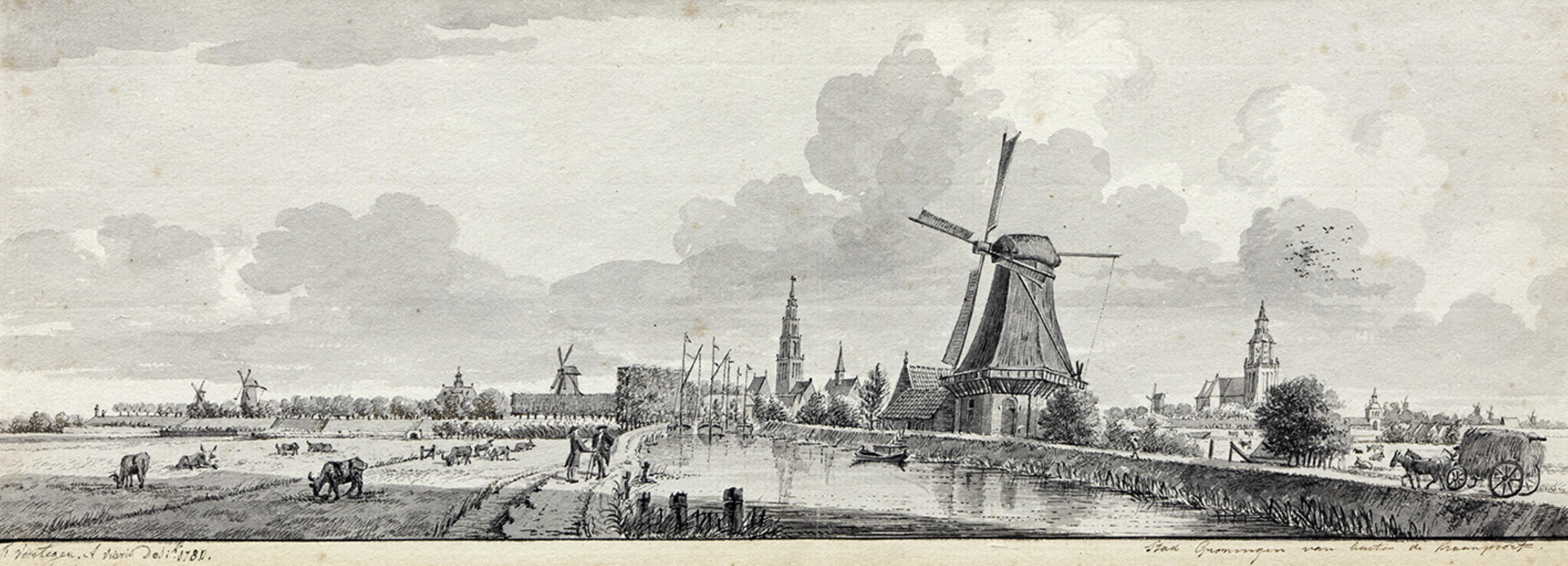 gezicht op Groningen buiten de Kranepoort